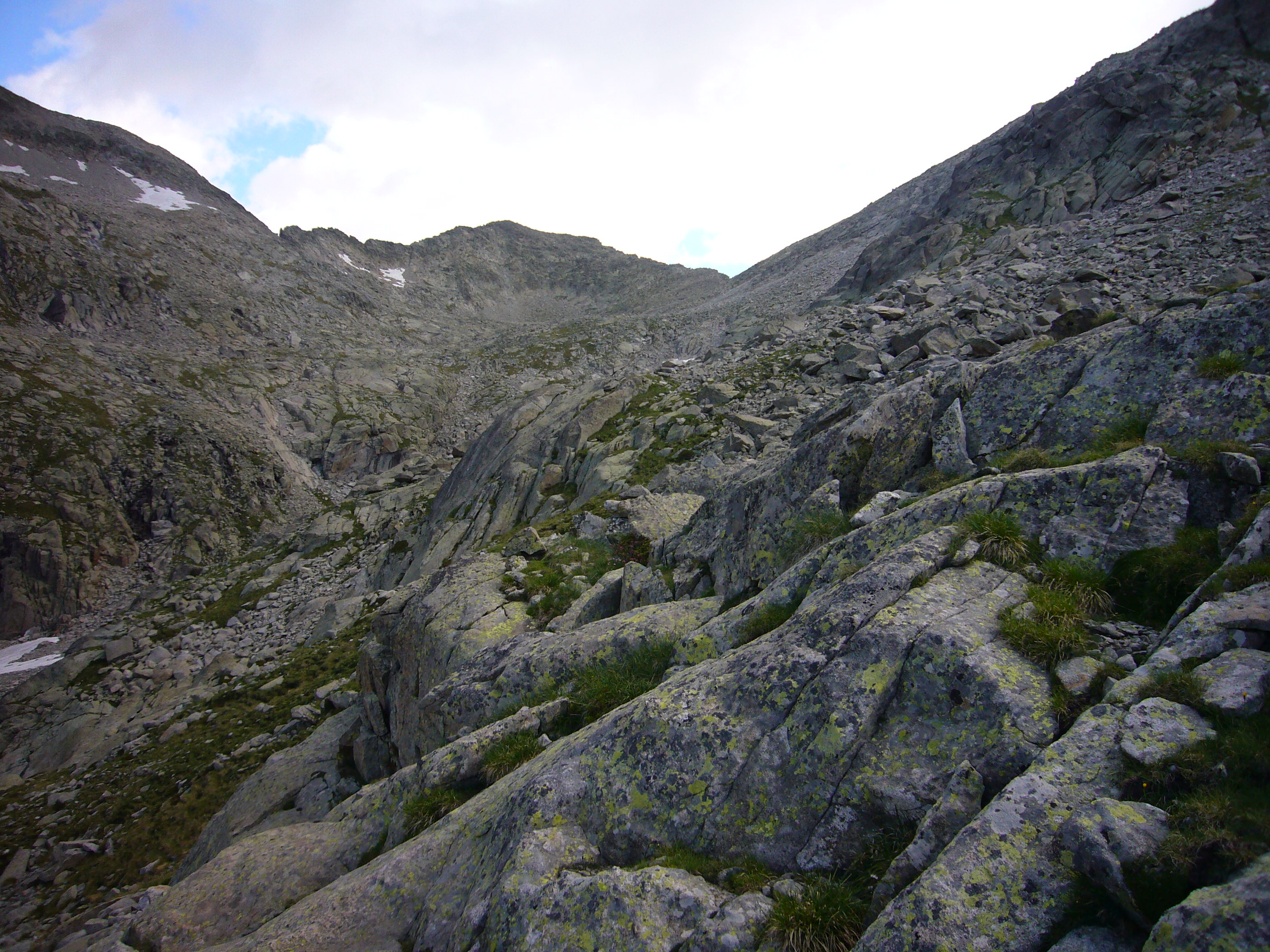 Coll de Colieto, Pic de Contraix i Coll de Sarradé, vistos des de la Vall de Sarradé; la Vall de Boí, Alta Ribagorça, Catalunya.